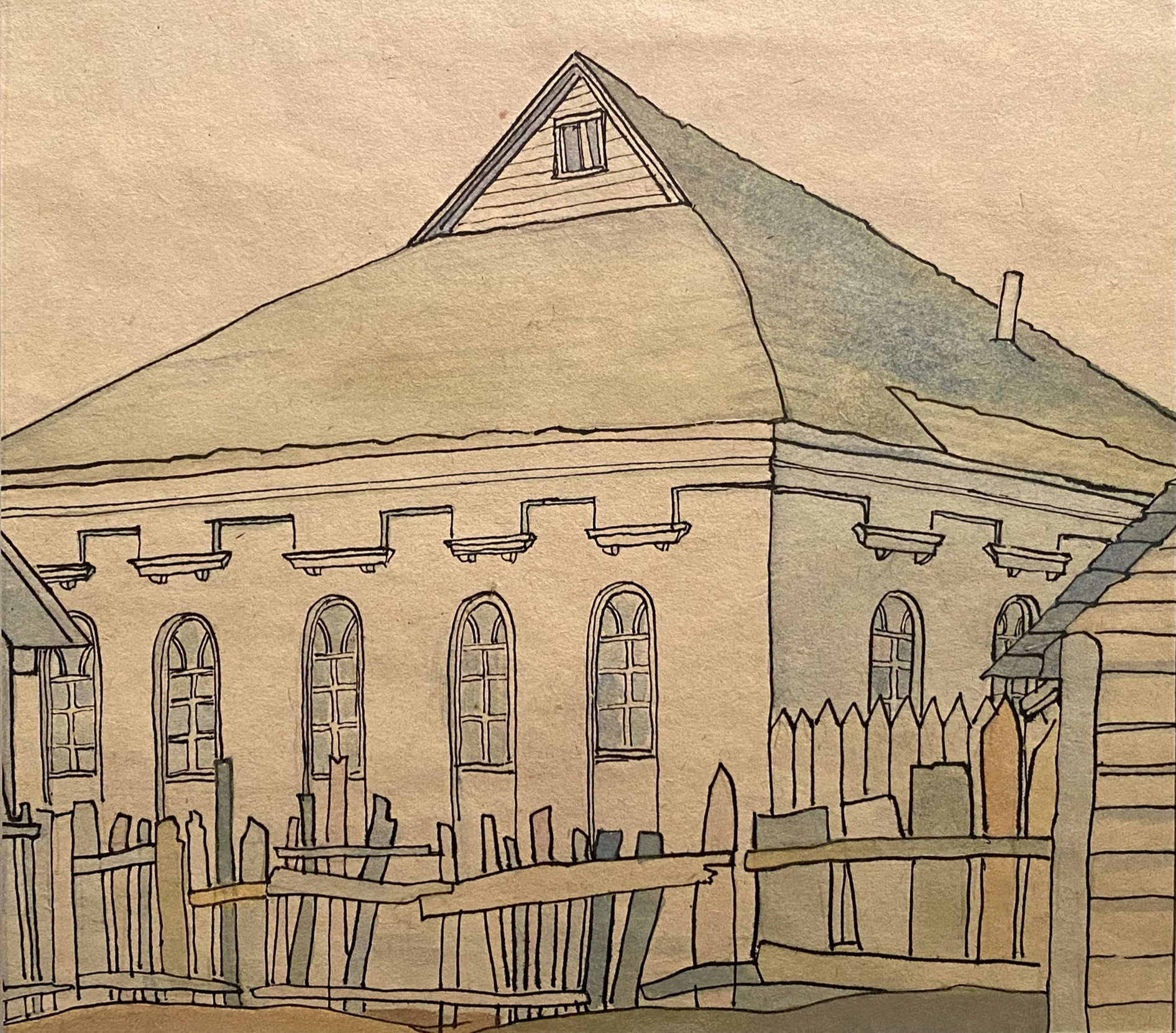 М. Філіповіч Сінагога ў Слуцку